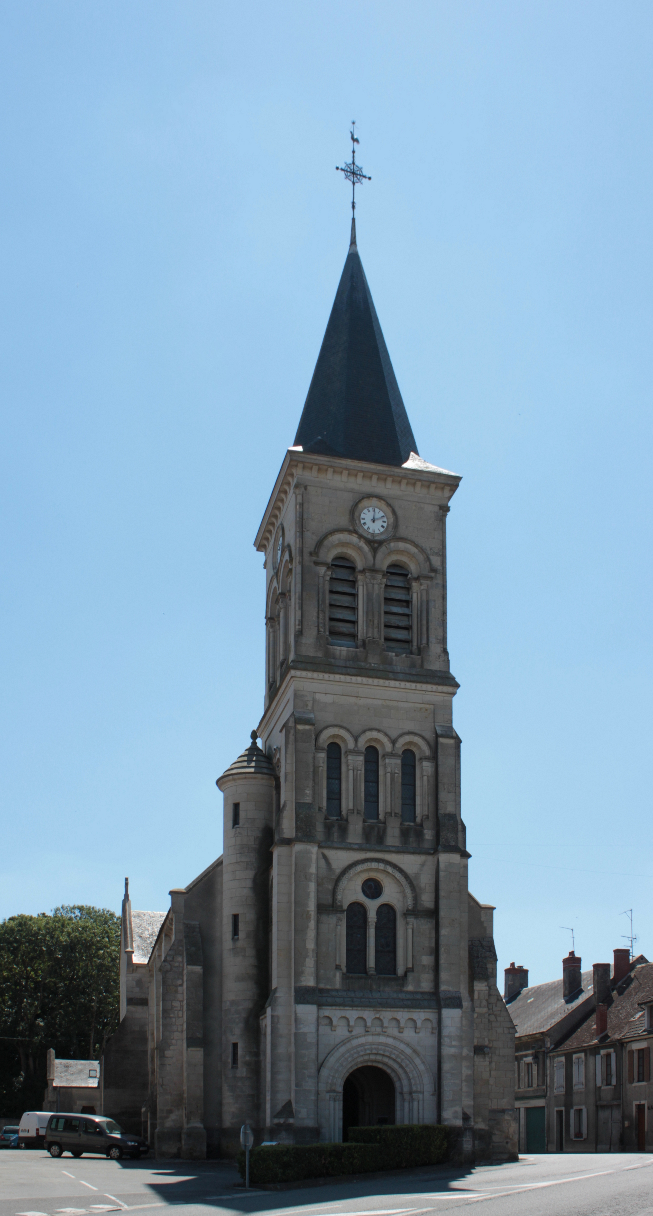 Église Saint-Germain, Fr-18-Blet.